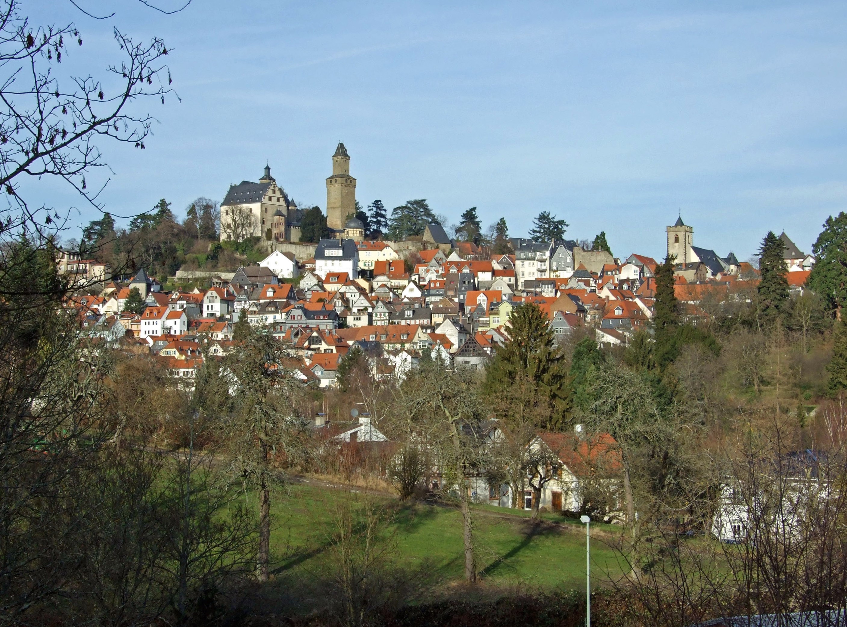 Kronberger Altstadt mit Burg